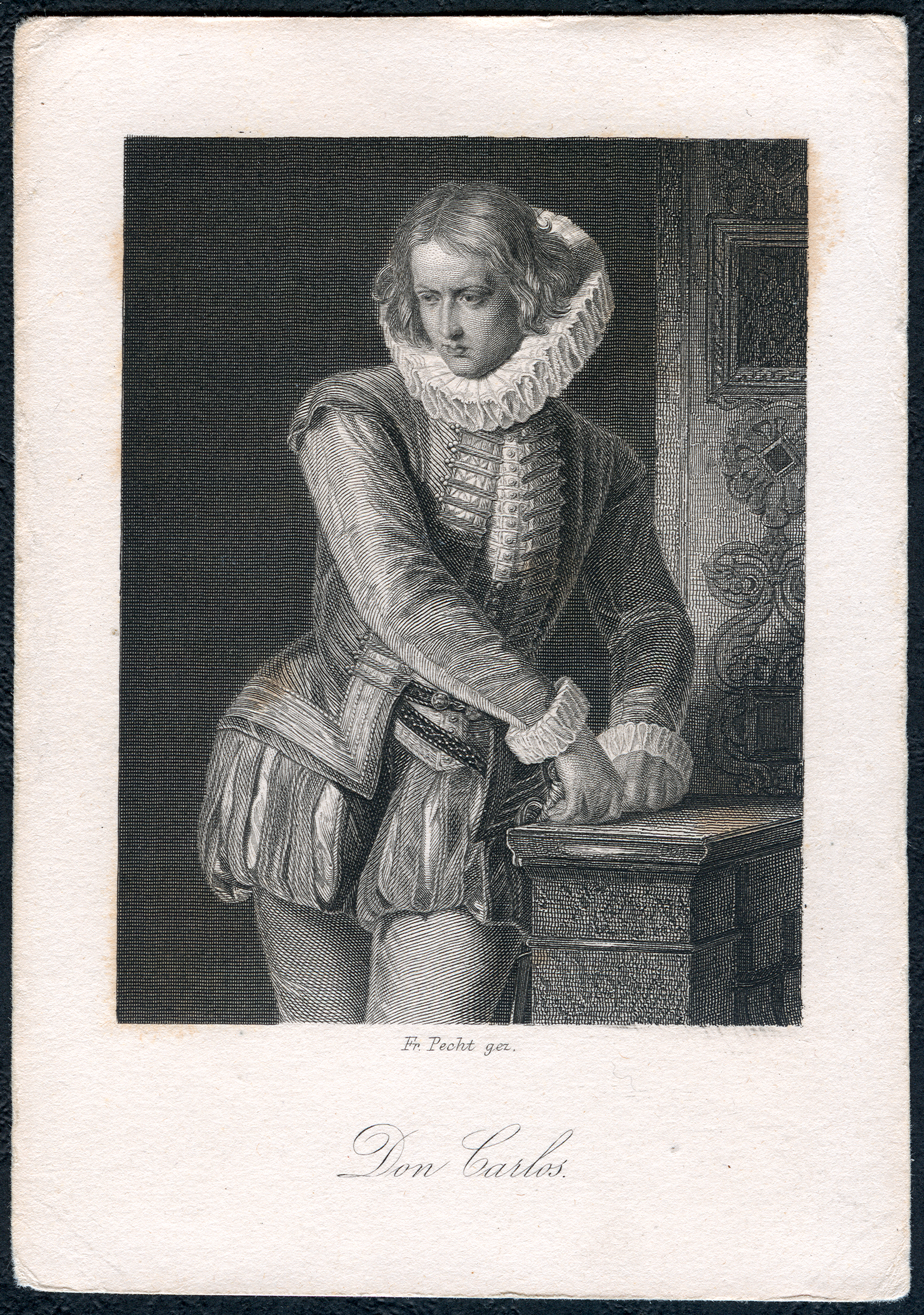 Don Carlos aus Friedrich Schillers Don Carlos, als Stahlstich gestochen von Johann Leonhard Raab um 1859 nach einer Zeichnung von Friedrich Pecht; das untertitelte Blatt hat die Maße circa 8 cm x 11,6 cm und auf der Rückseite keine weiteren Angaben. Es gehört zu einer Serie, möglicherweise als frühes Sammelbild, die als Schiller-Galerie von Friedrich Pecht und von Arthur von Ramberg bekannt geworden ist.